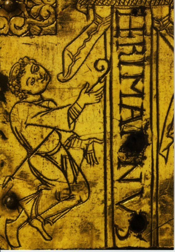 Stifterbild des Hermann-Ida-Kreuzes, Detail. Knieender Bischof.